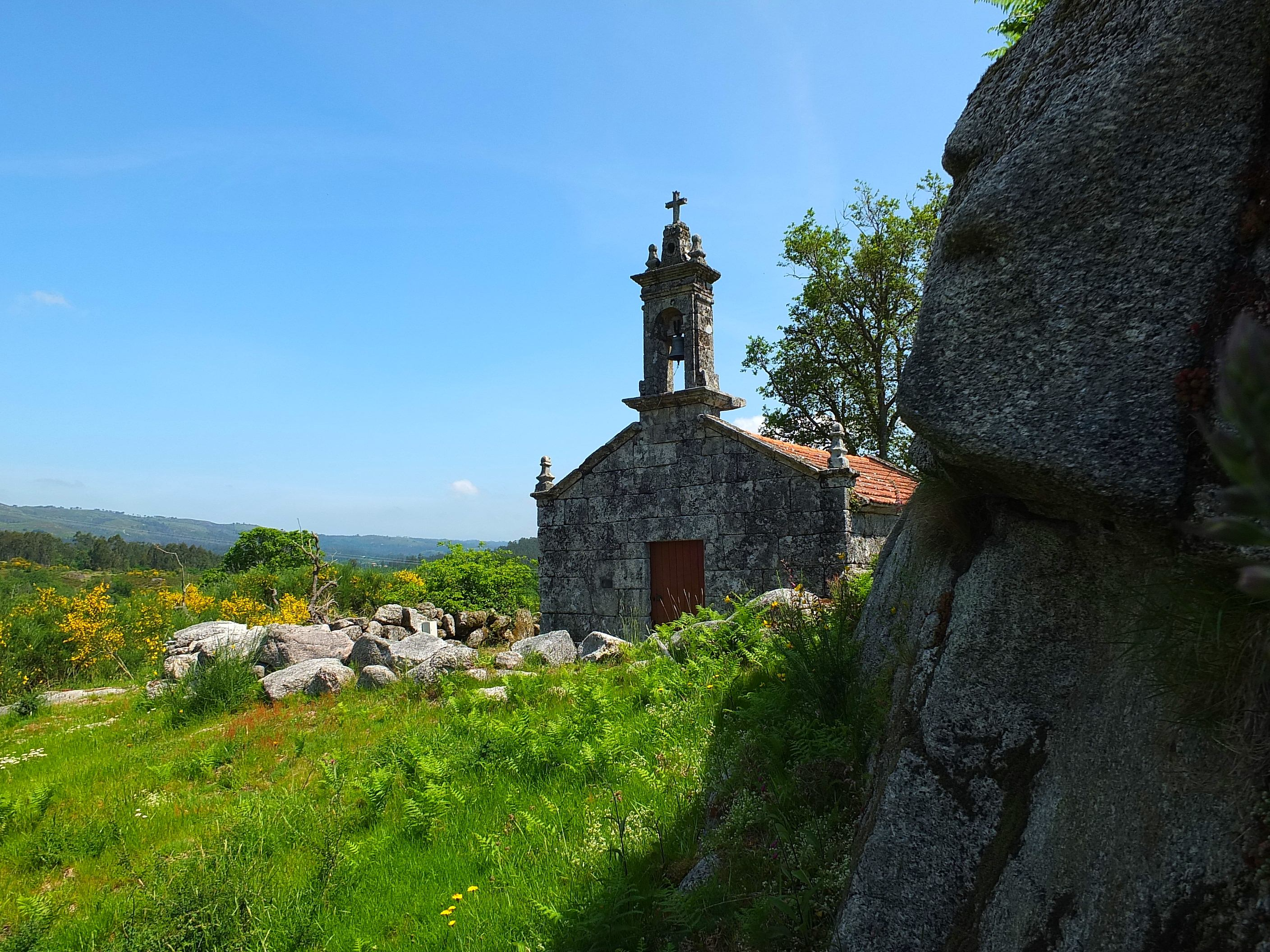 Serrapio, Pontevedra, Galicia, España